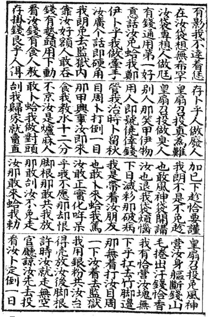 中文（台灣）: 廈門會文堂歌仔冊《最新失德了歌》書影。